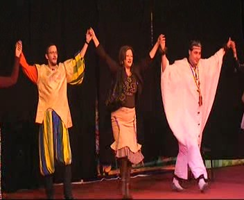 سوسن شيخ البساتنة مسرح